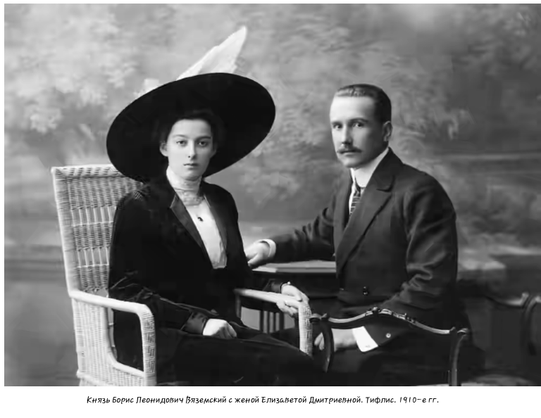 Князь Борис Леонидович Вяземский с женой с женой Елизаветой Дмитриевной, урожденной графиней Шереметевой, 1910-е, Тифлис